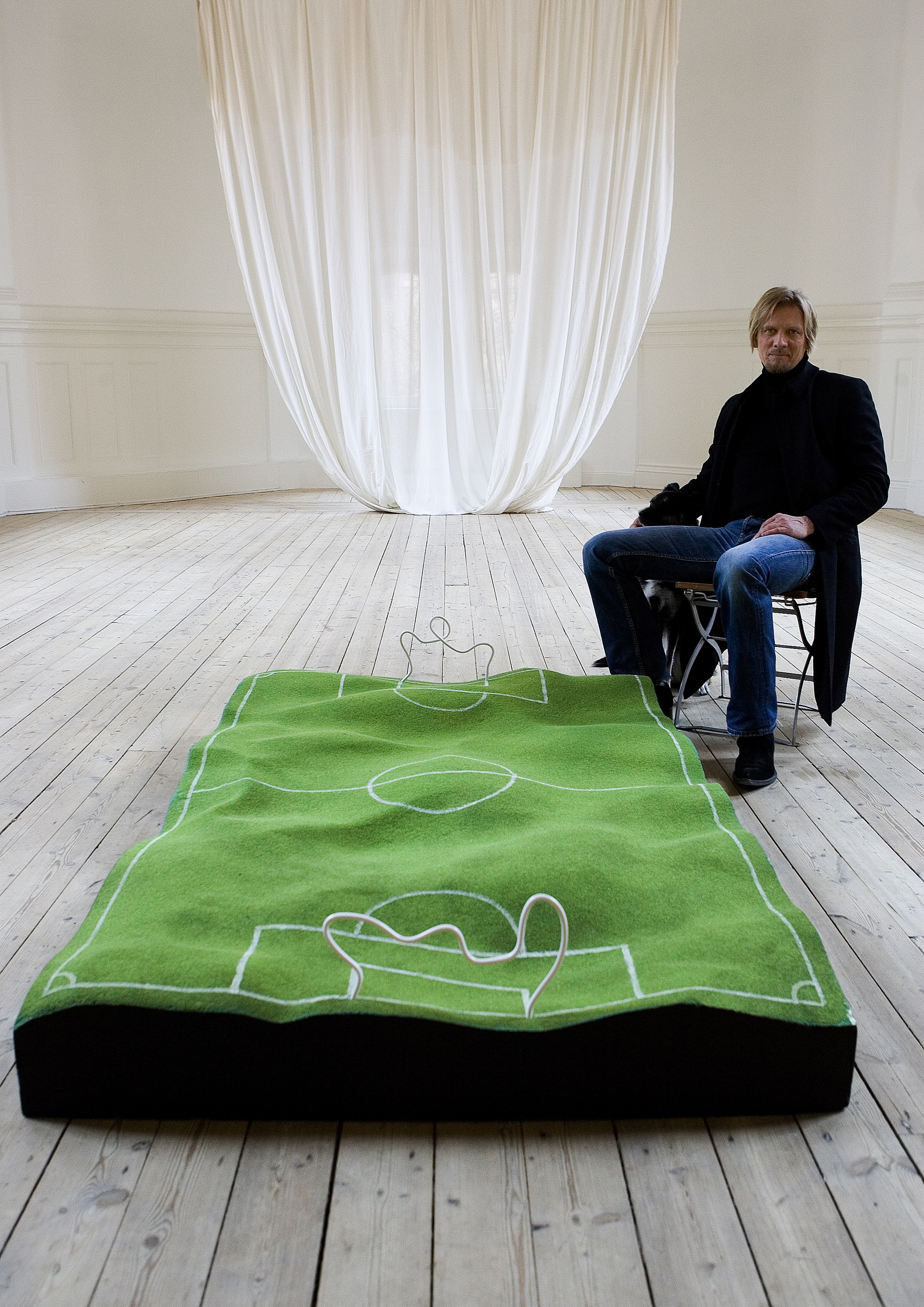 Johan Ferner Ström. Photo: Kent Billeqvist